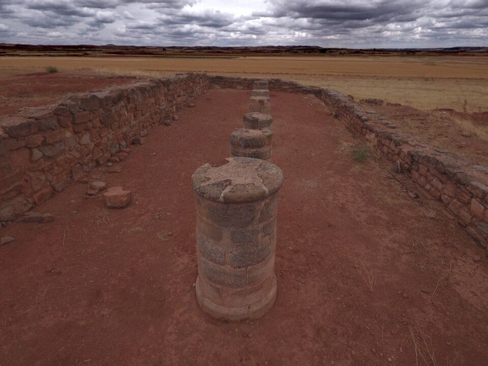 zona columnada, primera fase constructiva.